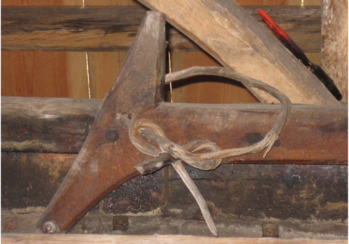 Hamleband av vidje